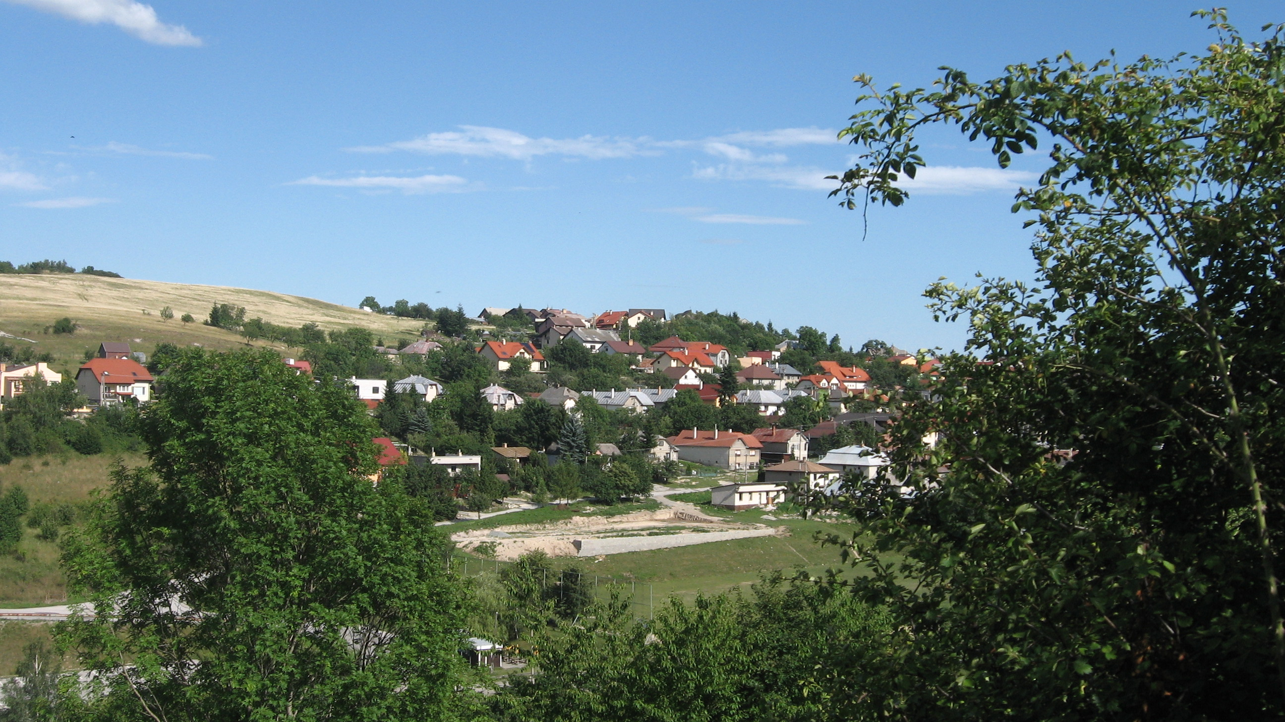 Kavečany sú mestská časť Košíc, súčasť okresu Košice I.